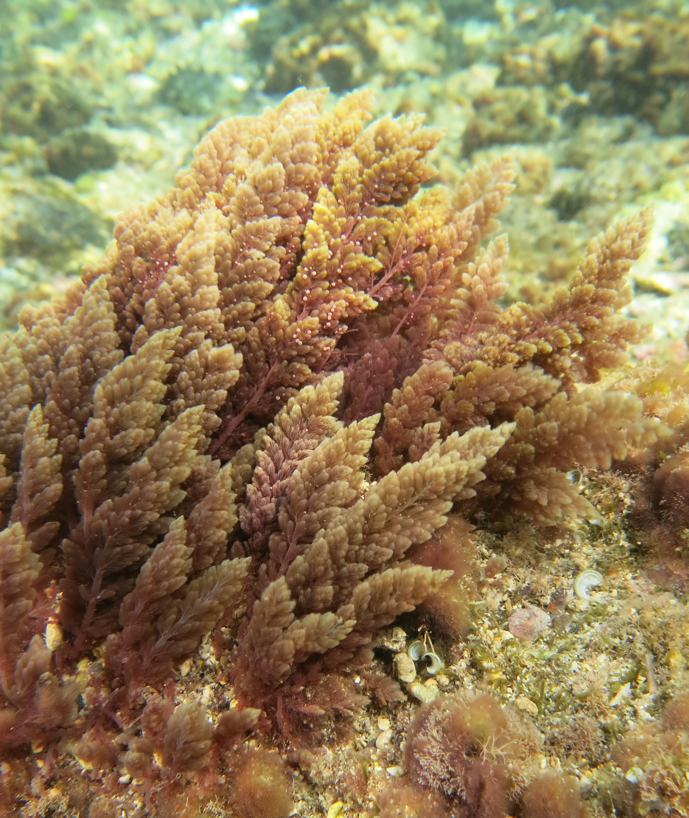 L'algue rouge Asparagopsis taxiformis à la Réunion (lagon de Saint-Leu).